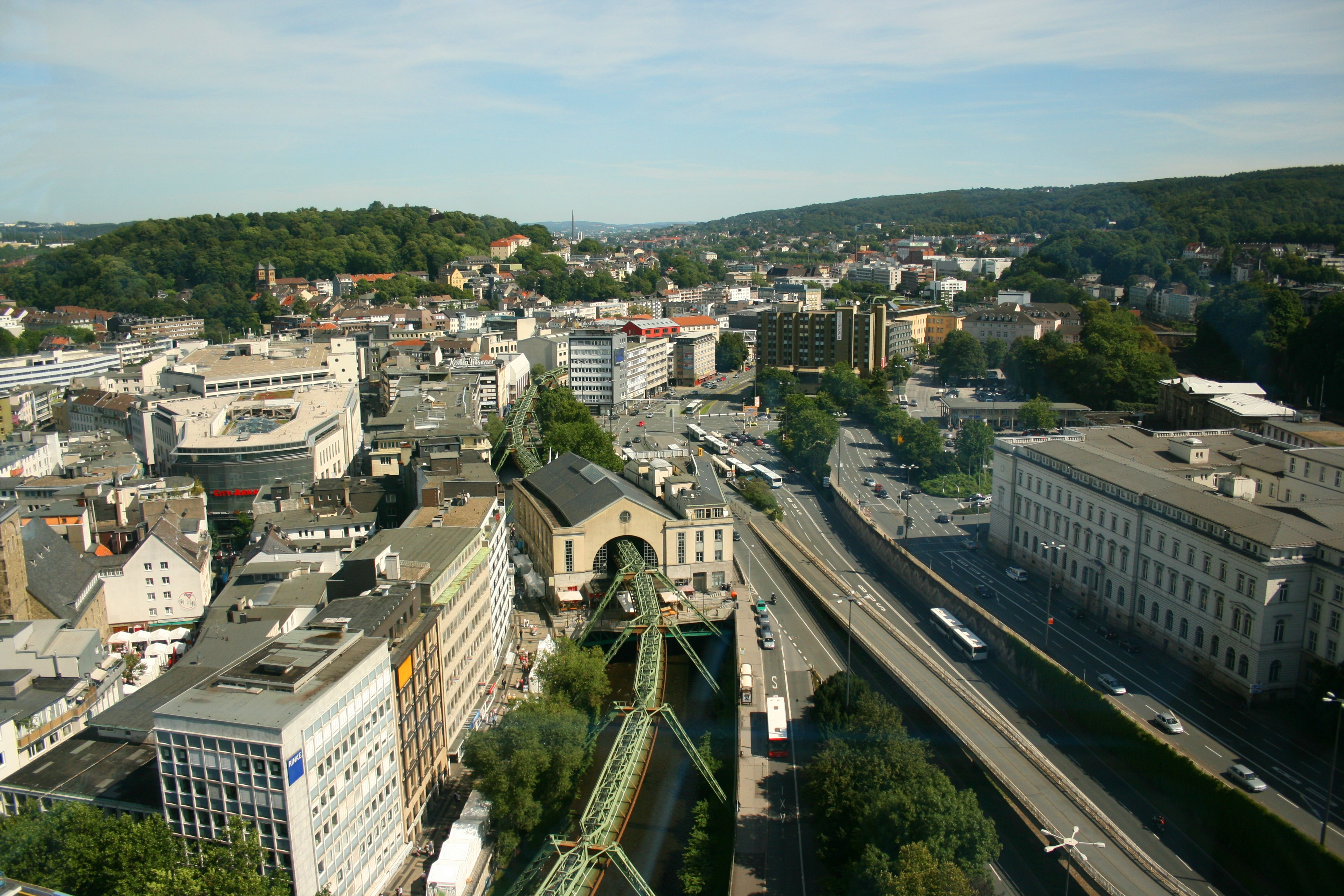 Blick von der 19. Etage des Sparkassenturms beim NRW-Tag in Wuppertal